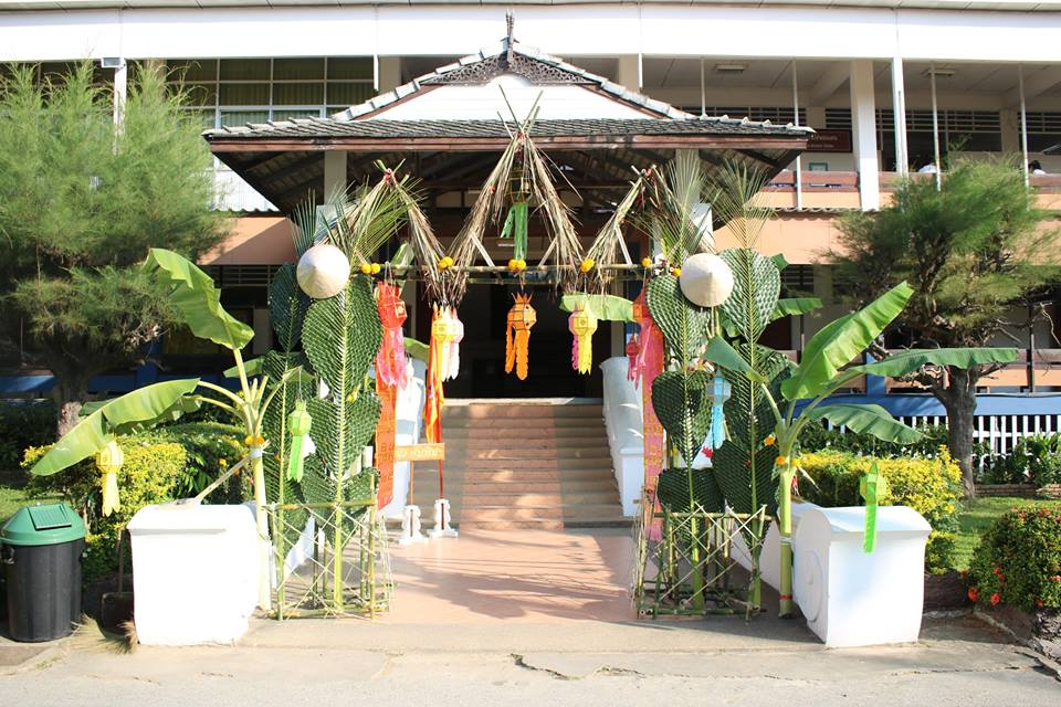 งานประเพณียี่เป็ง(ลอยกระทง) โรงเรียนสันป่าตองวิทยาคม